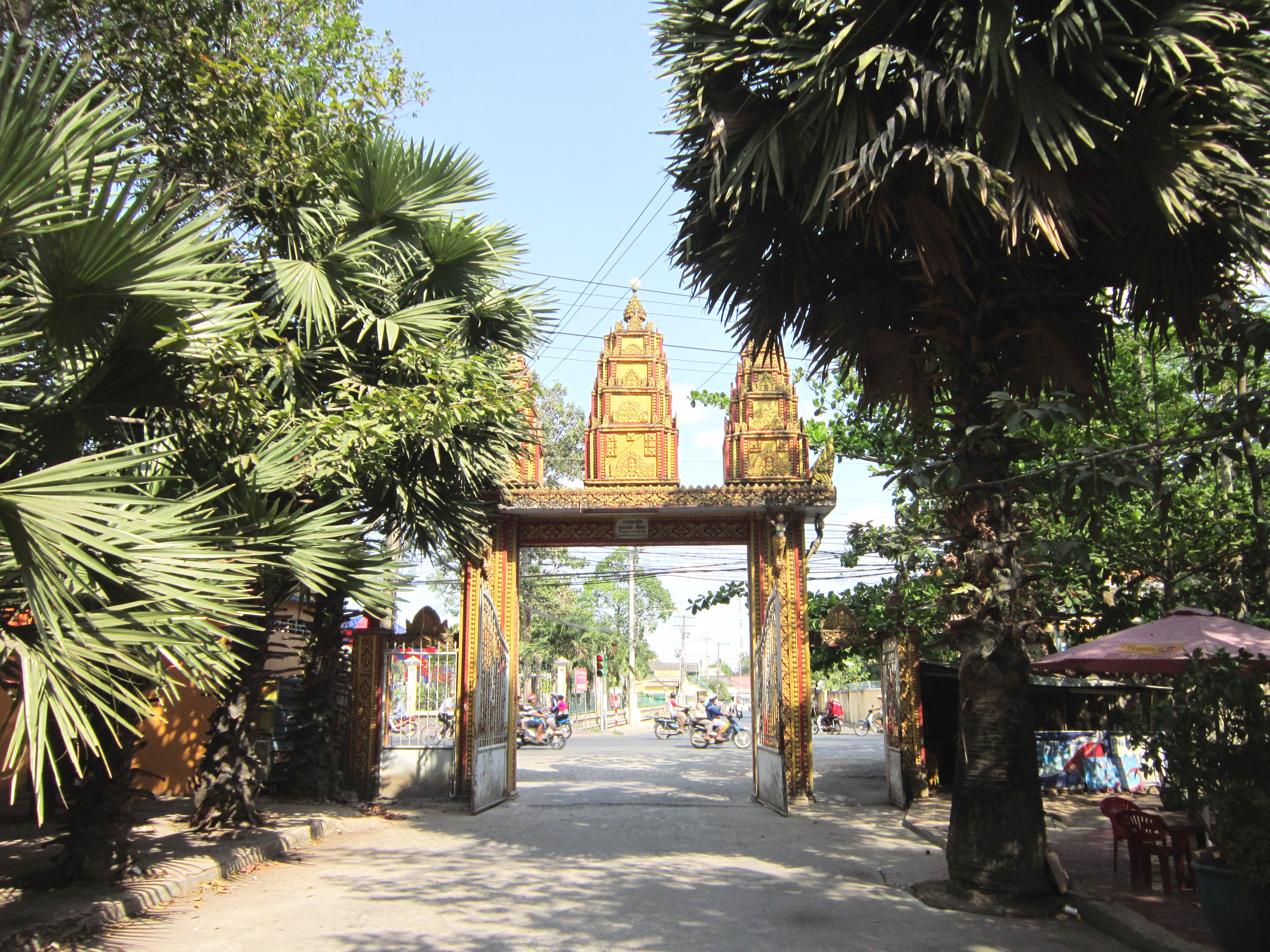 Cổng chính chùa Khléang (nhìn từ phía sau) ở thành phố Sóc Trăng, tỉnh Sóc Trăng, Việt Nam.